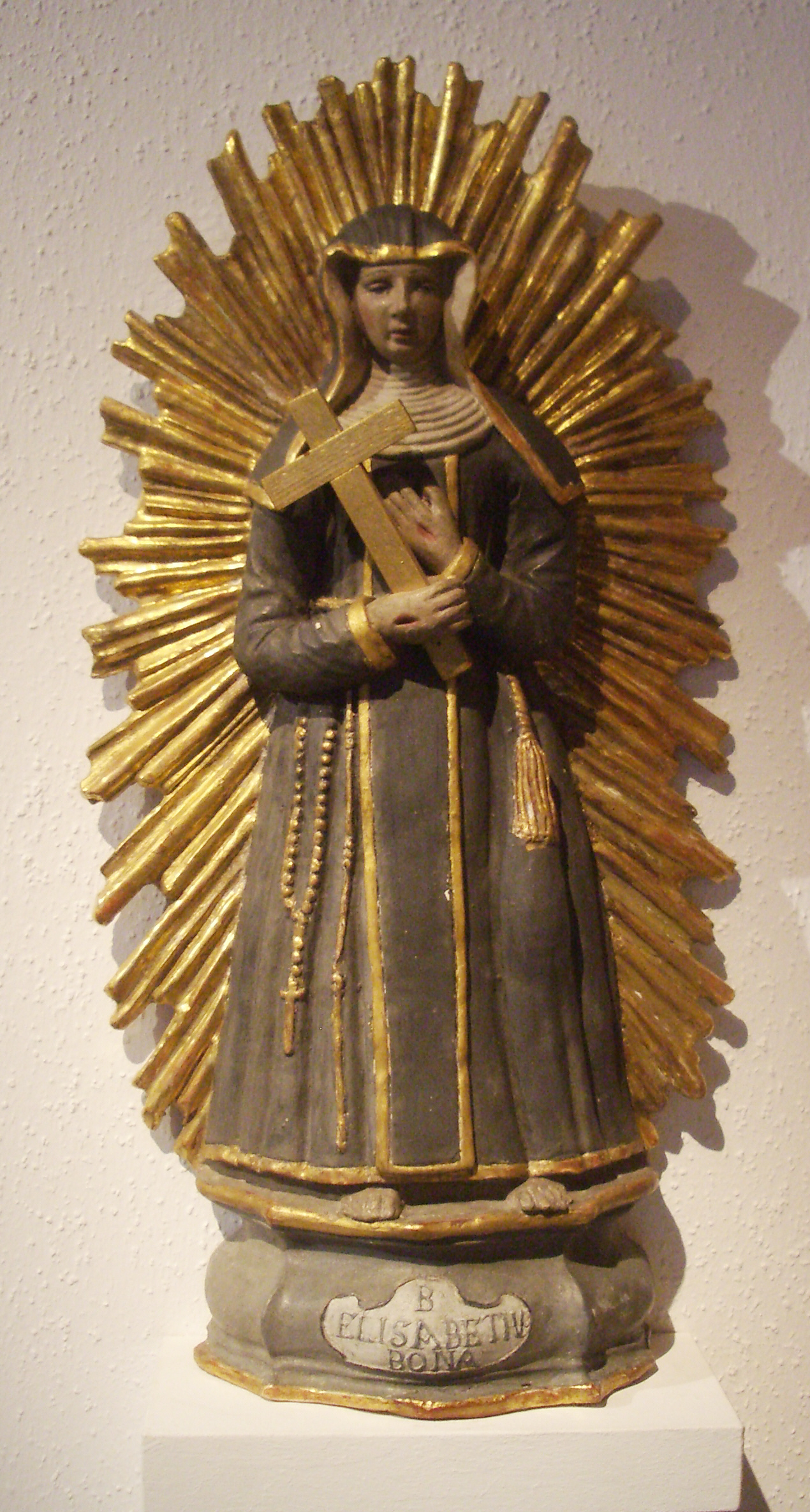 Städtisches Museum im Kornhaus, Bad Waldsee: Figur der Guten Beth von Reute